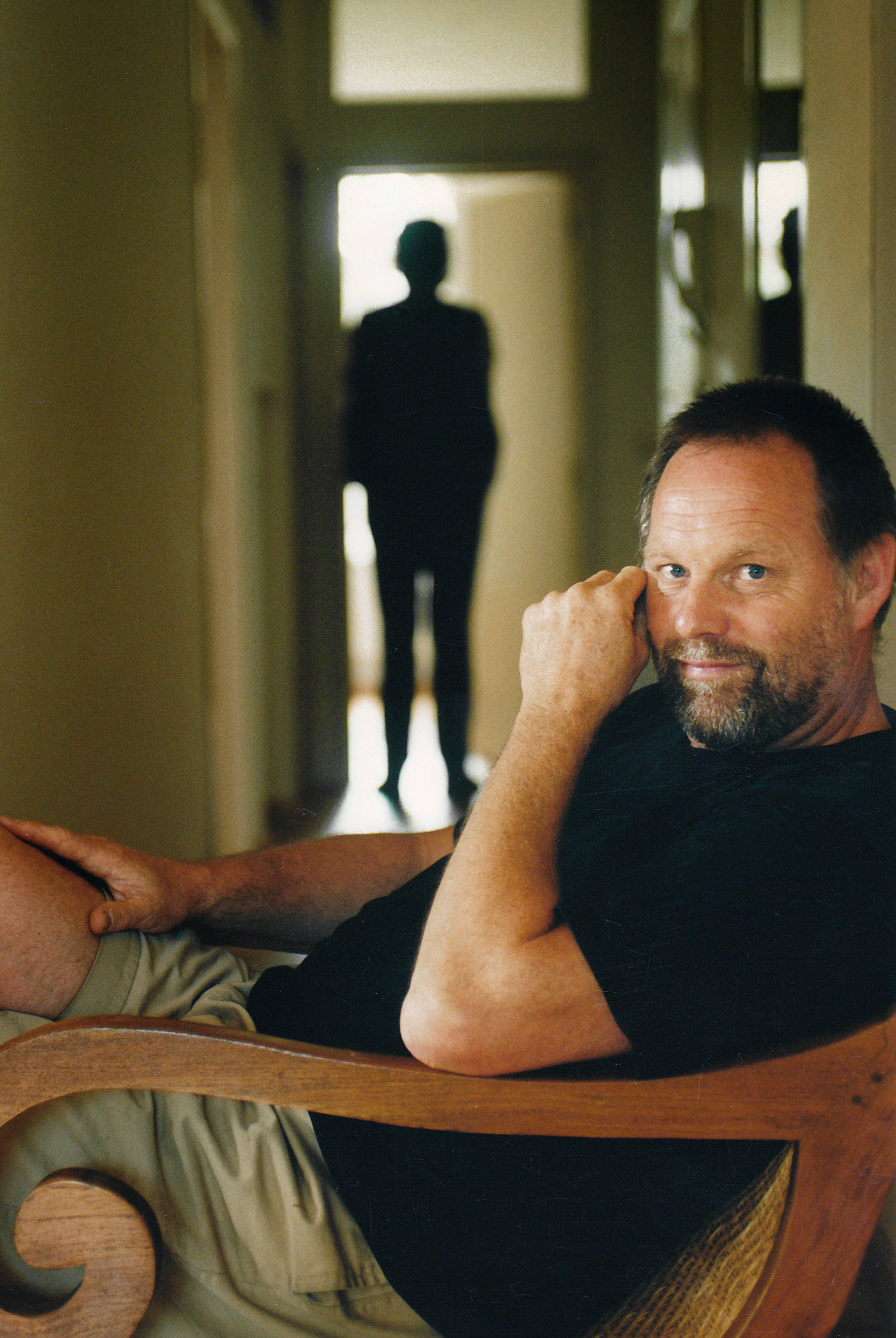 Bram Vermeulen, Nederlands zanger, componist, cabaretier en volleyballer